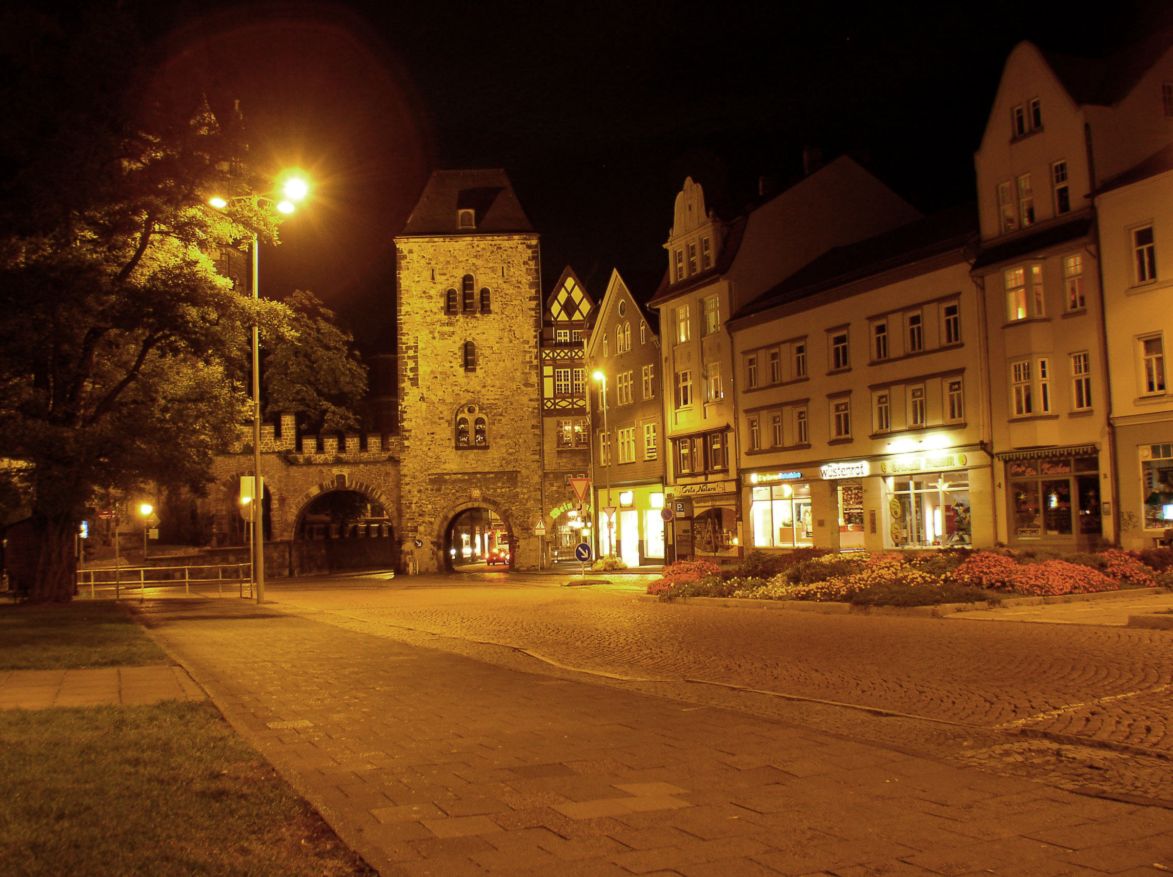 Nikolaitor Eisenach nachts